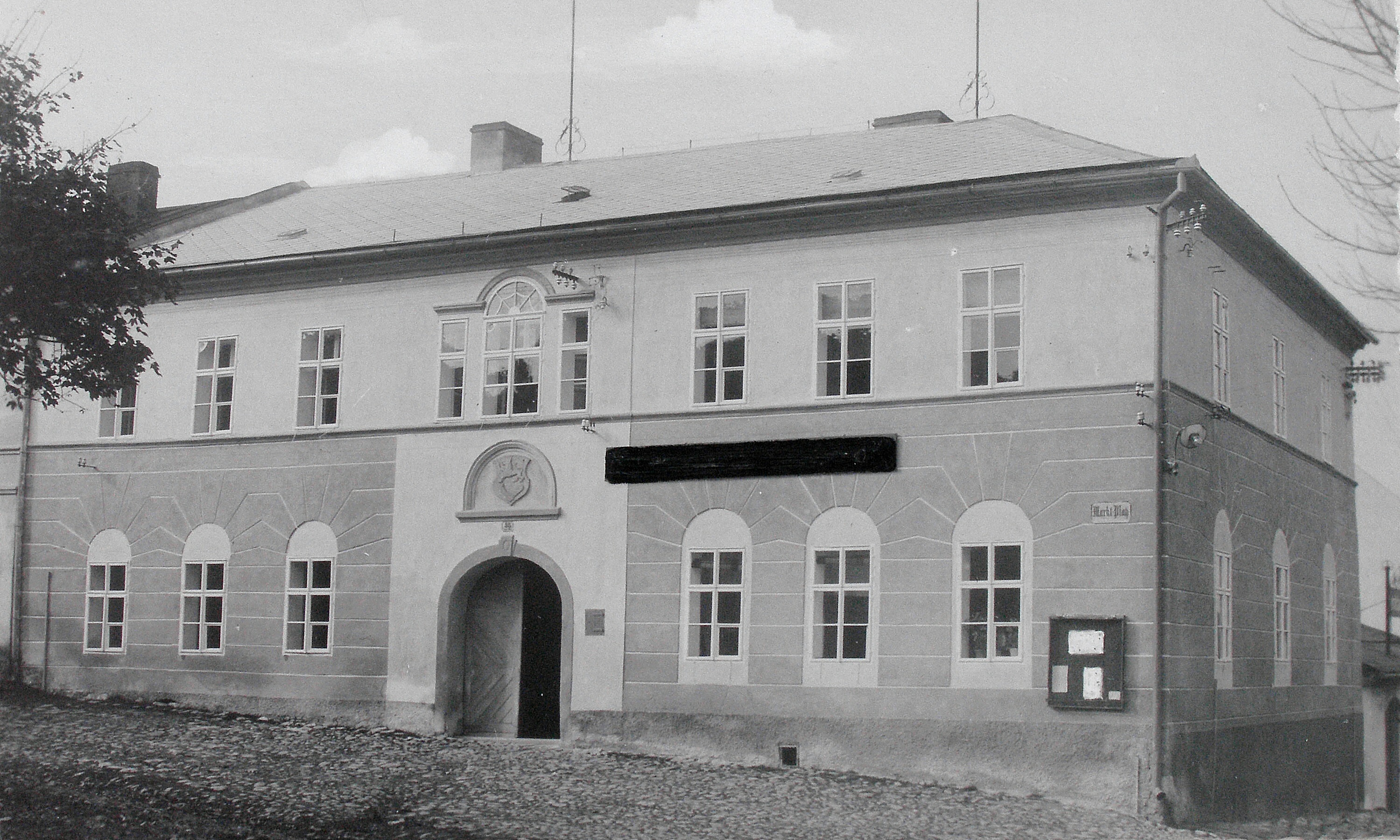 Toužim, městská radnice čp. 35 kolem roku 1935.